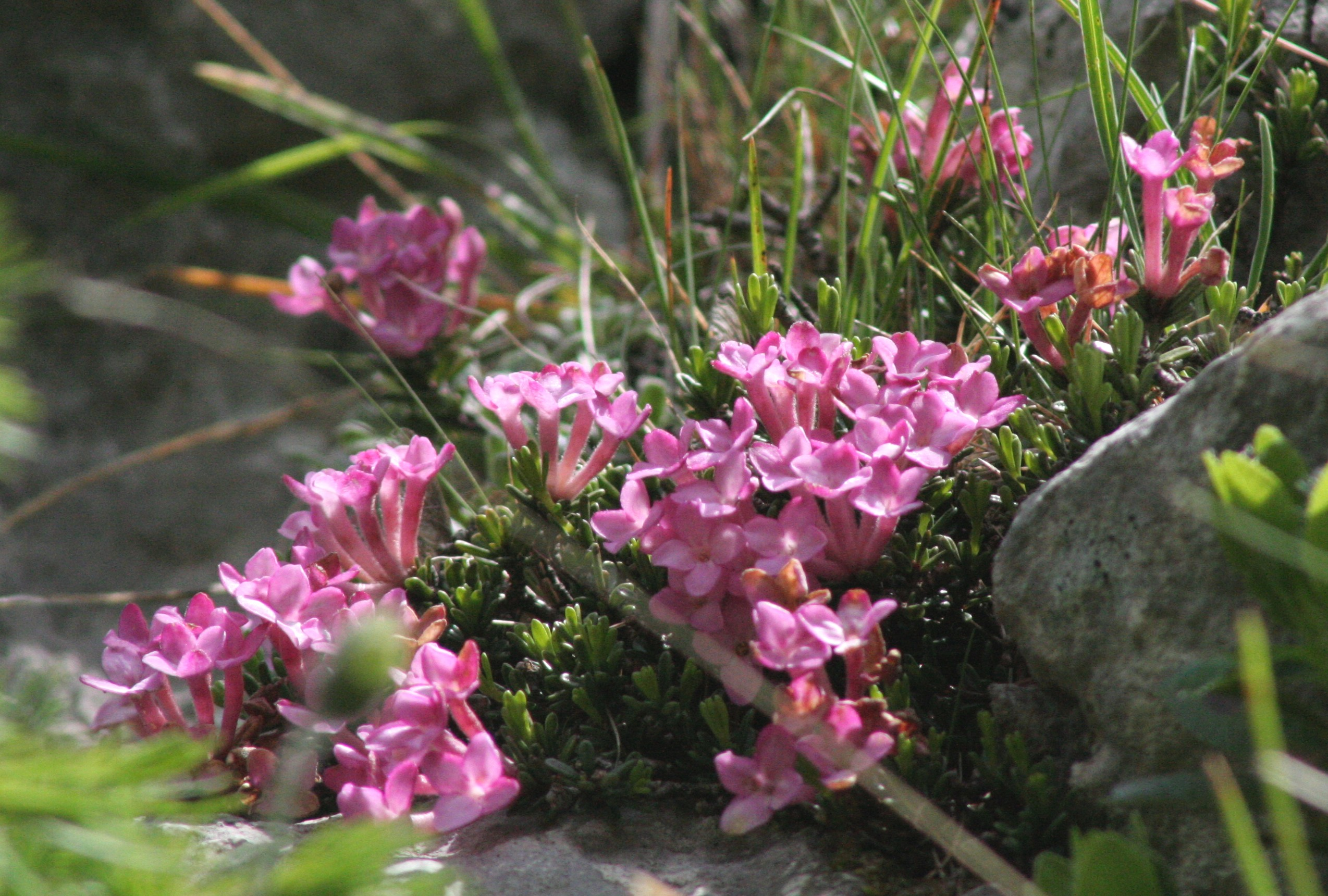 Daphne_petraea (Dafne minore) Località : "Giardino Botanico delle Alpi Orientali", Monte Faverghera (BL), 1500 m s.l.m.